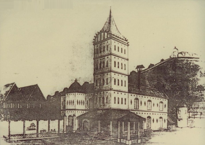 Istana Hijau yang dibina pada tahun 1865